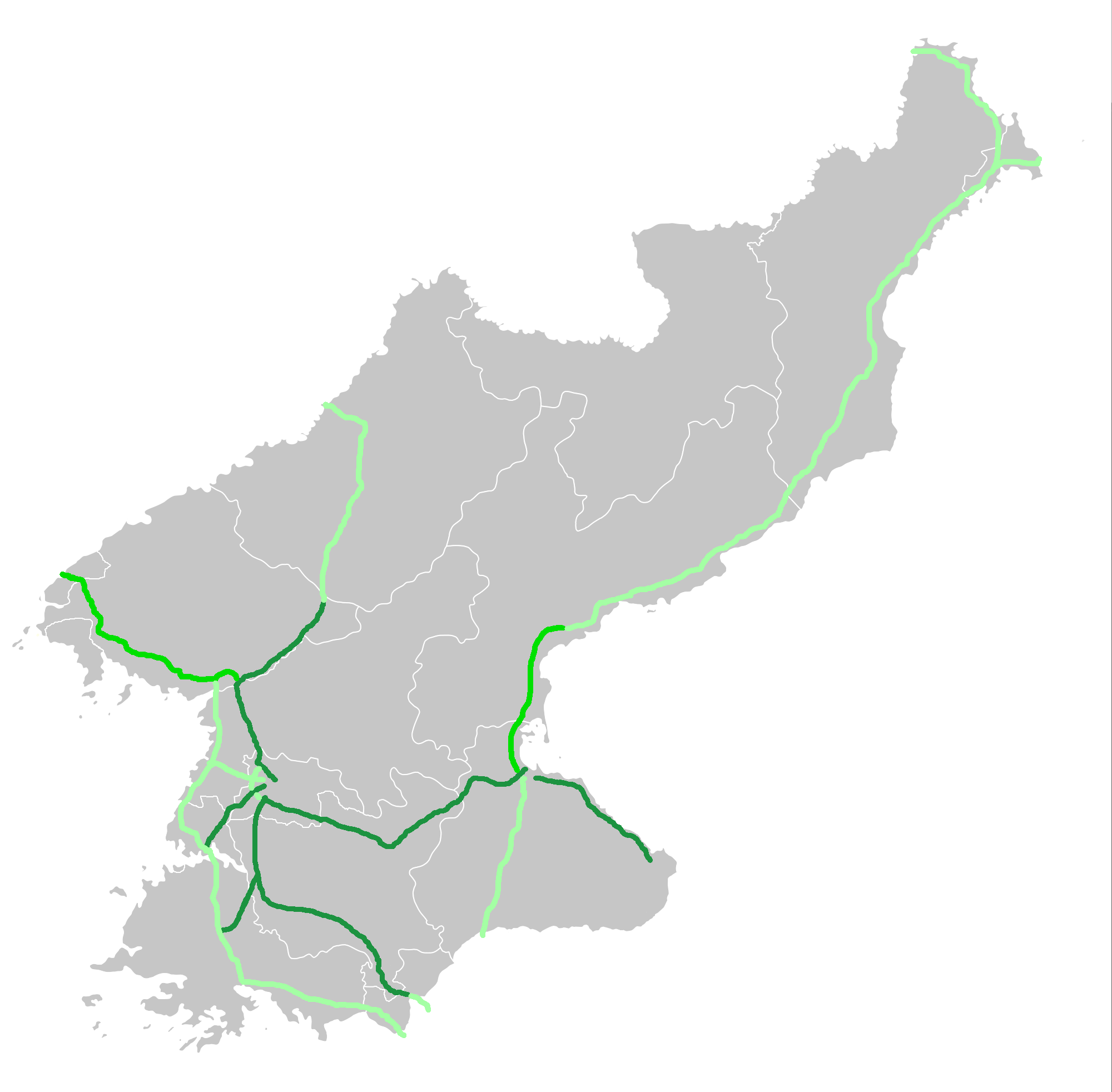 نقشه آزادراههای در دست بهره برداری، در دست ساخت و در نظر گرفته شده برای کره شمالی